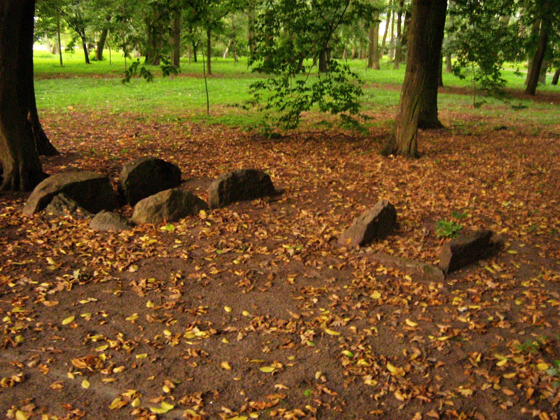 Zwei jungsteinzeitliche Steinkistengräber im Kulturpark in Neubrandenburg, unweit des Tollensesees. Die Gräber stammen nicht original von diesem Ort. Das große Grab wurde 1878 im Stargarder Bruch entdeckt und barg die Gebeine von drei Erwachsenen und zwei Kindern. Nach der Untersuchung des Grabes sorgte der Museumsverein Neubrandenburg für den Erhalt und setzte es an den jetzigen Standort um. Das kleine Steinkistengrab stammt ursprünglich aus einer Wiese in der Datzeniederung.